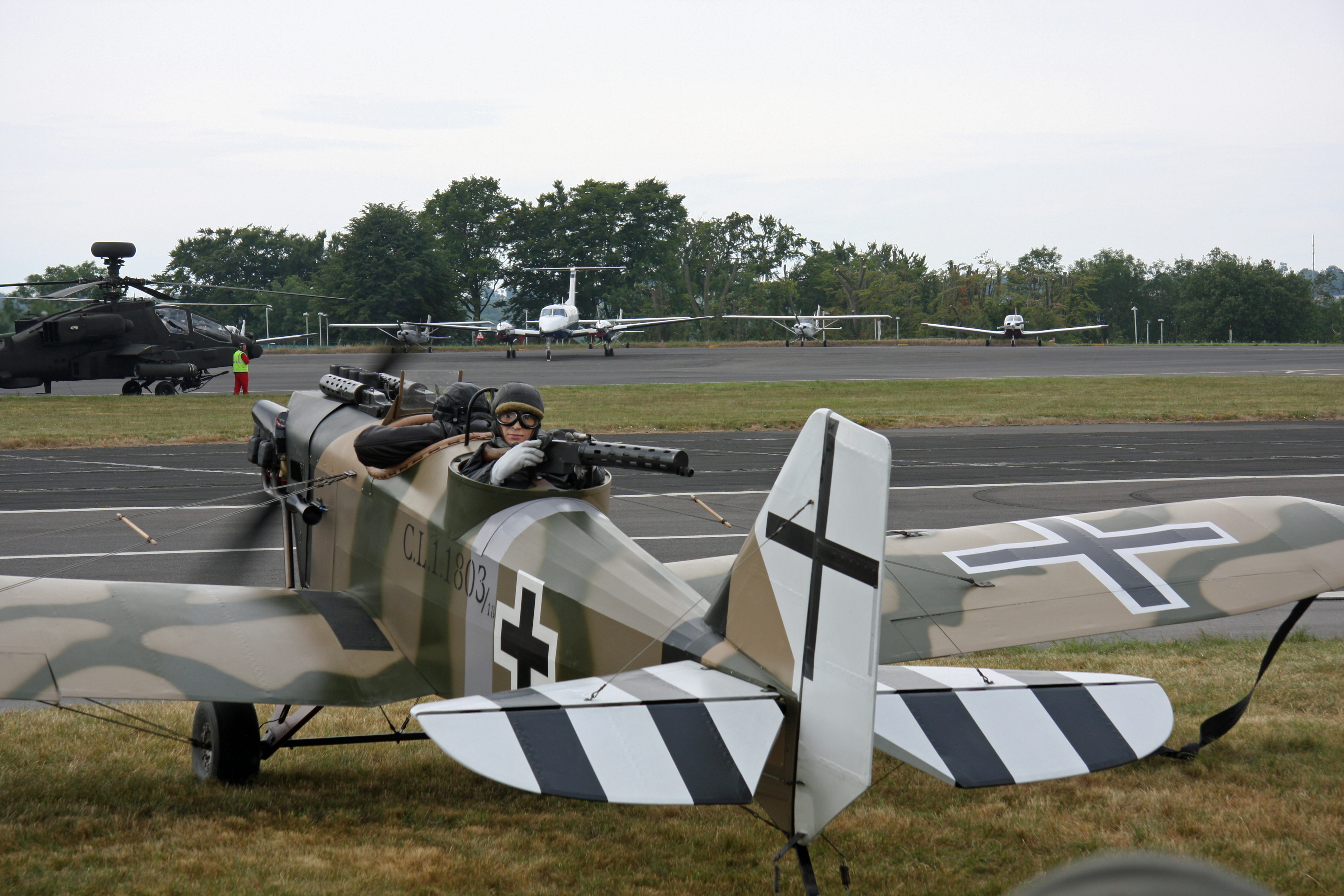 Junkers CL1